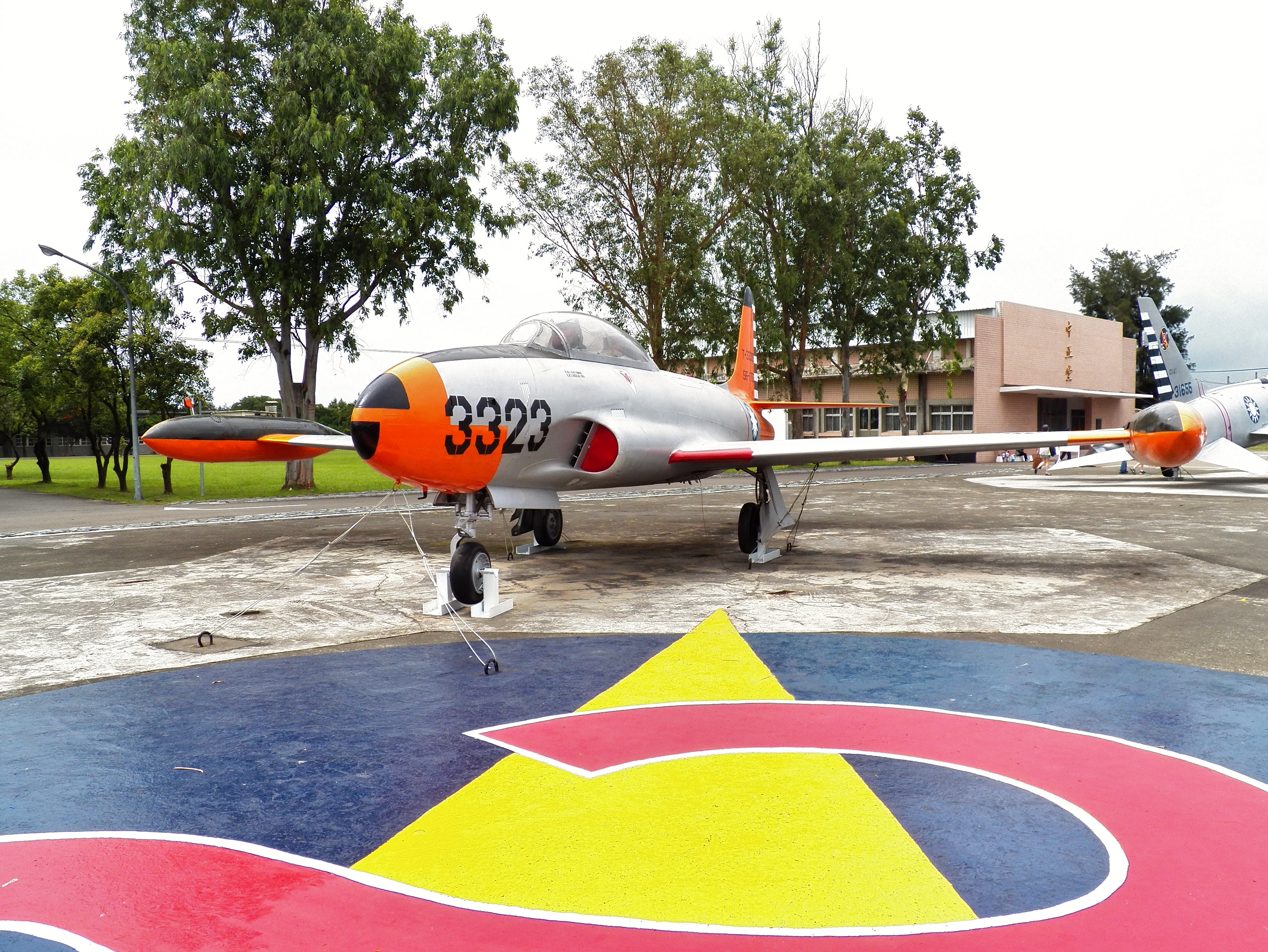 空軍新竹基地經國樓廣場保存之中華民國空軍T-33教練機正面，攝於2012年營區開放活動。